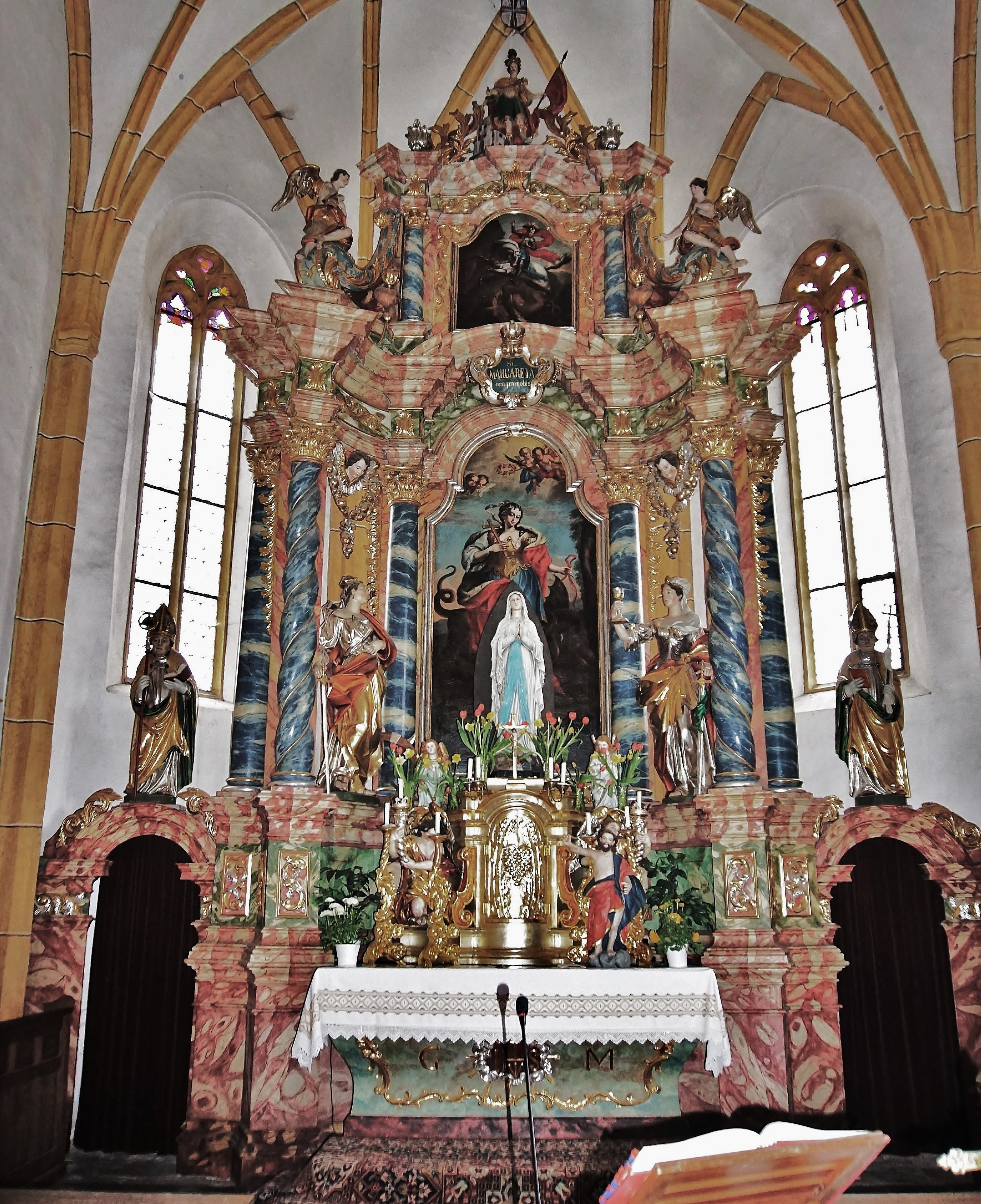 Kath. Pfarrkirche Hl. Margaretha, Reichenau (Kärnten), der Hochaltar